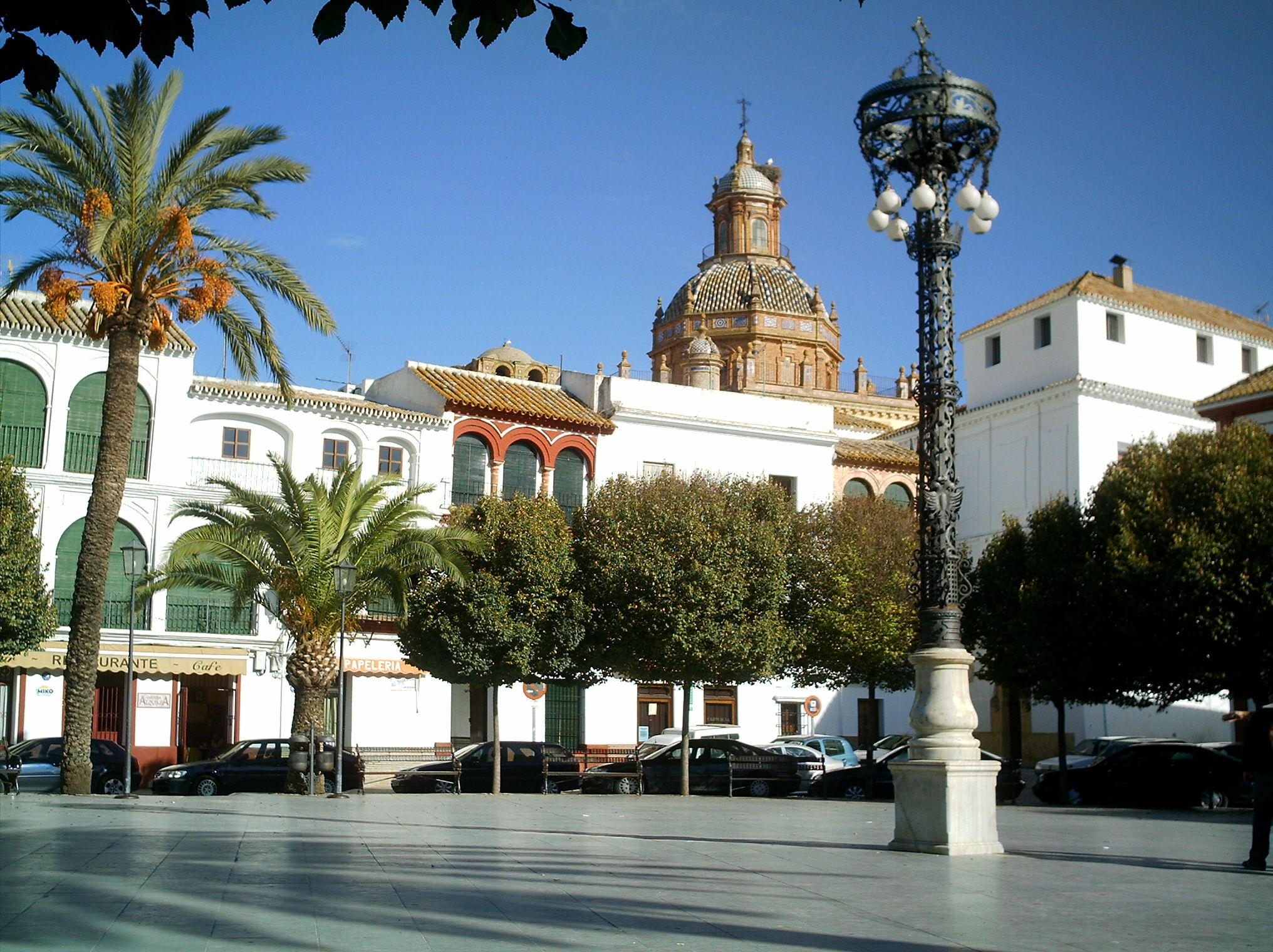 Plaza San Fernando. Visión del Ayuntamiento y la Iglesia del Divino Salvador. Carmona (Sevilla)